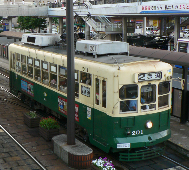 精霊流しのため日中から運転されていた長崎電気軌道2号系統赤迫行き。通常は深夜1往復のみだが、このように、祭りや年越しの際にも運転される。普段は蛍茶屋行きと浦上車庫行きの1便ずつのため、赤迫行きは臨時便のみ。